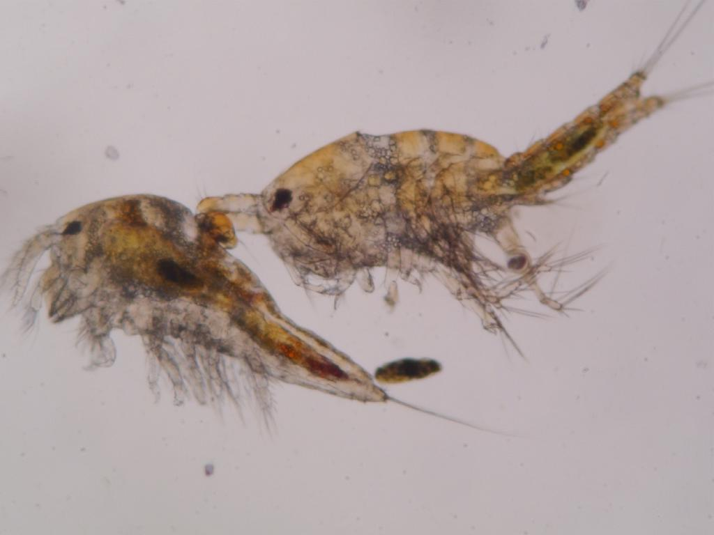 Tigriopus sp.(T. japonicus?) 2015/06/06 和歌山県田辺市：Tanabe City. Wakayama Pref. Japan